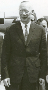 Aspecte de la sosirea vicepreşedintelui Consiliului de Miniştri al Poloniei, Zenon Novak. (7 iunie 1967).